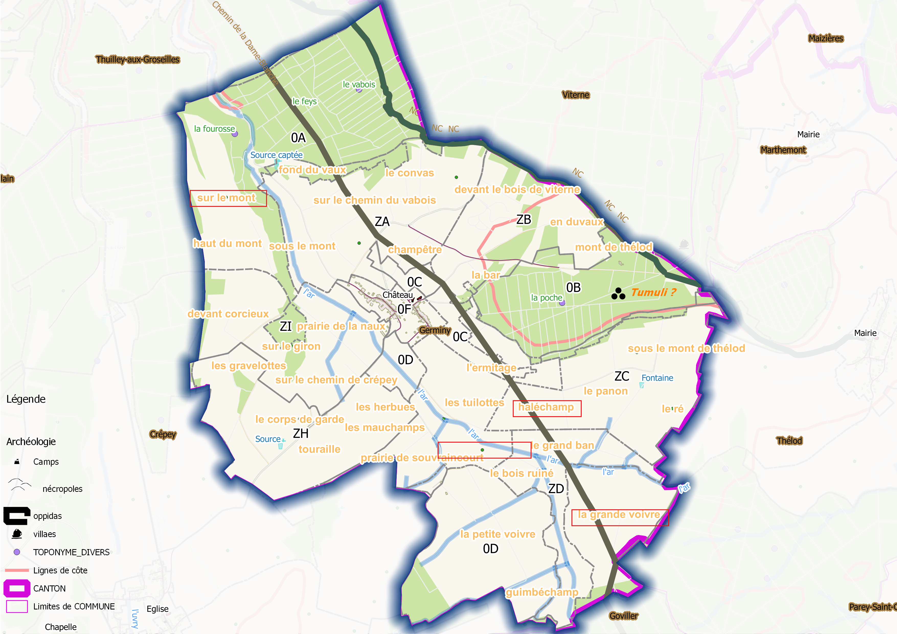 Germiny (ban communal) OSM et Qgis, mentions additionnelles